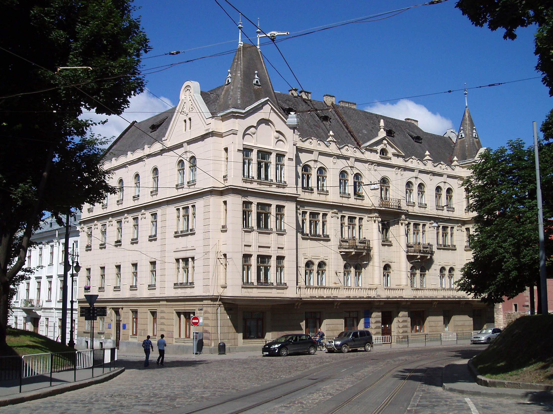 Будинок № 31 на вулиці Валовій (також № 3 на вулиці Підвальній) у Львові. Збудований за проектом Карела Боубілка (1912)